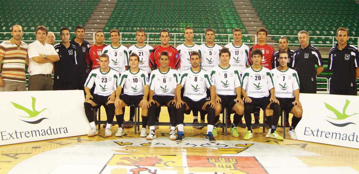 Plantilla AD EXTREMADURA-Cáceres 2016 FS